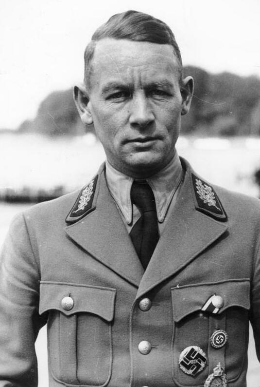 Scherl Gauleiter Friedrich Karl Florian [1934] 22757-34